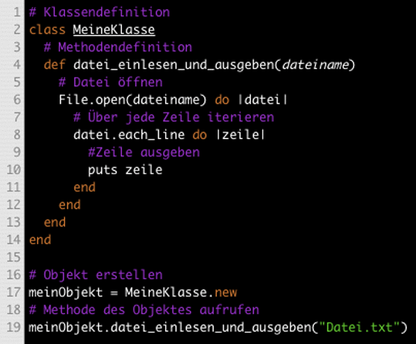 Source Code von Ruby in dem Editor TextMate andere Versionen: keine